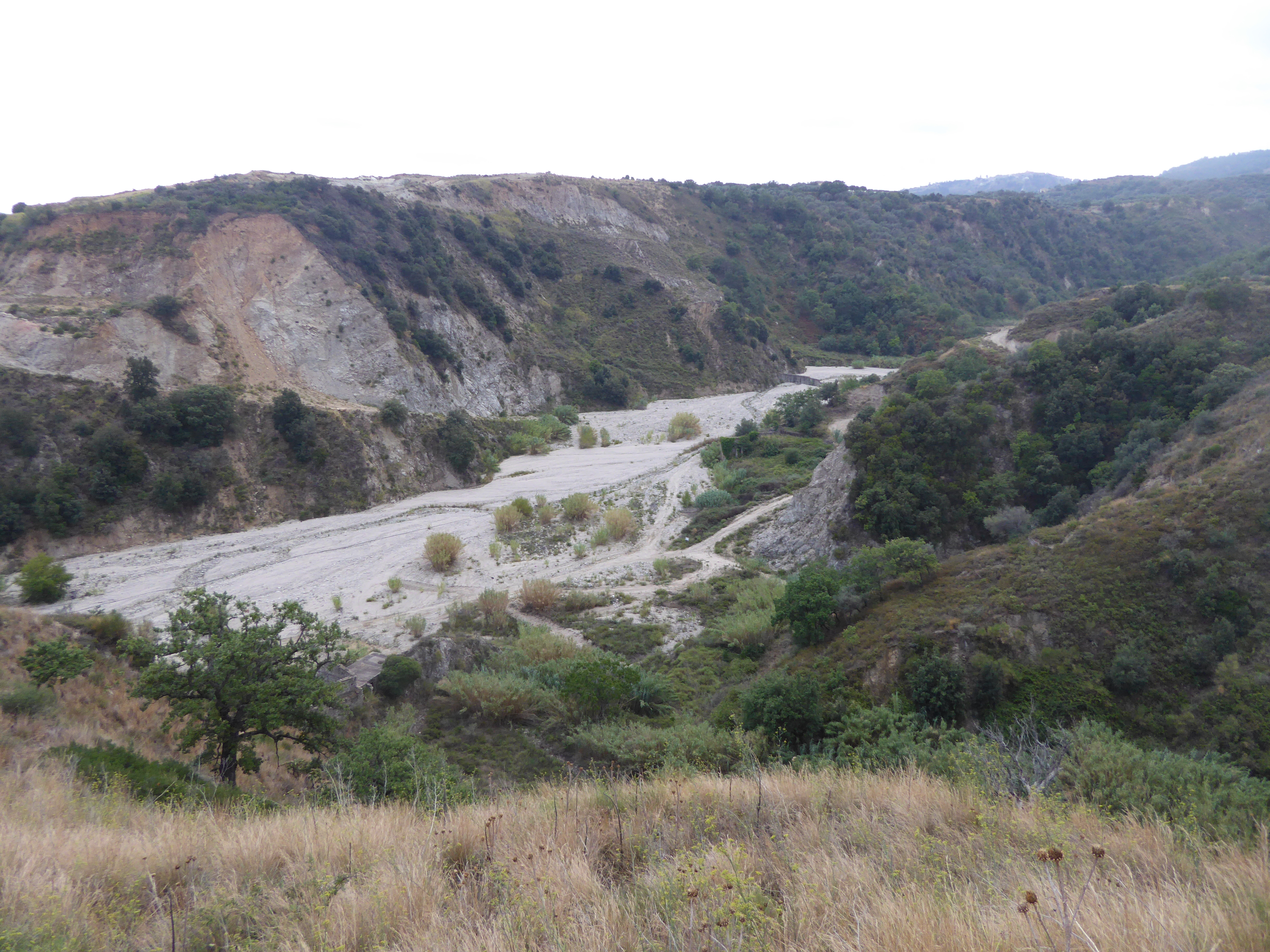 Torrente Vodà a Badolato (agosto 2018)